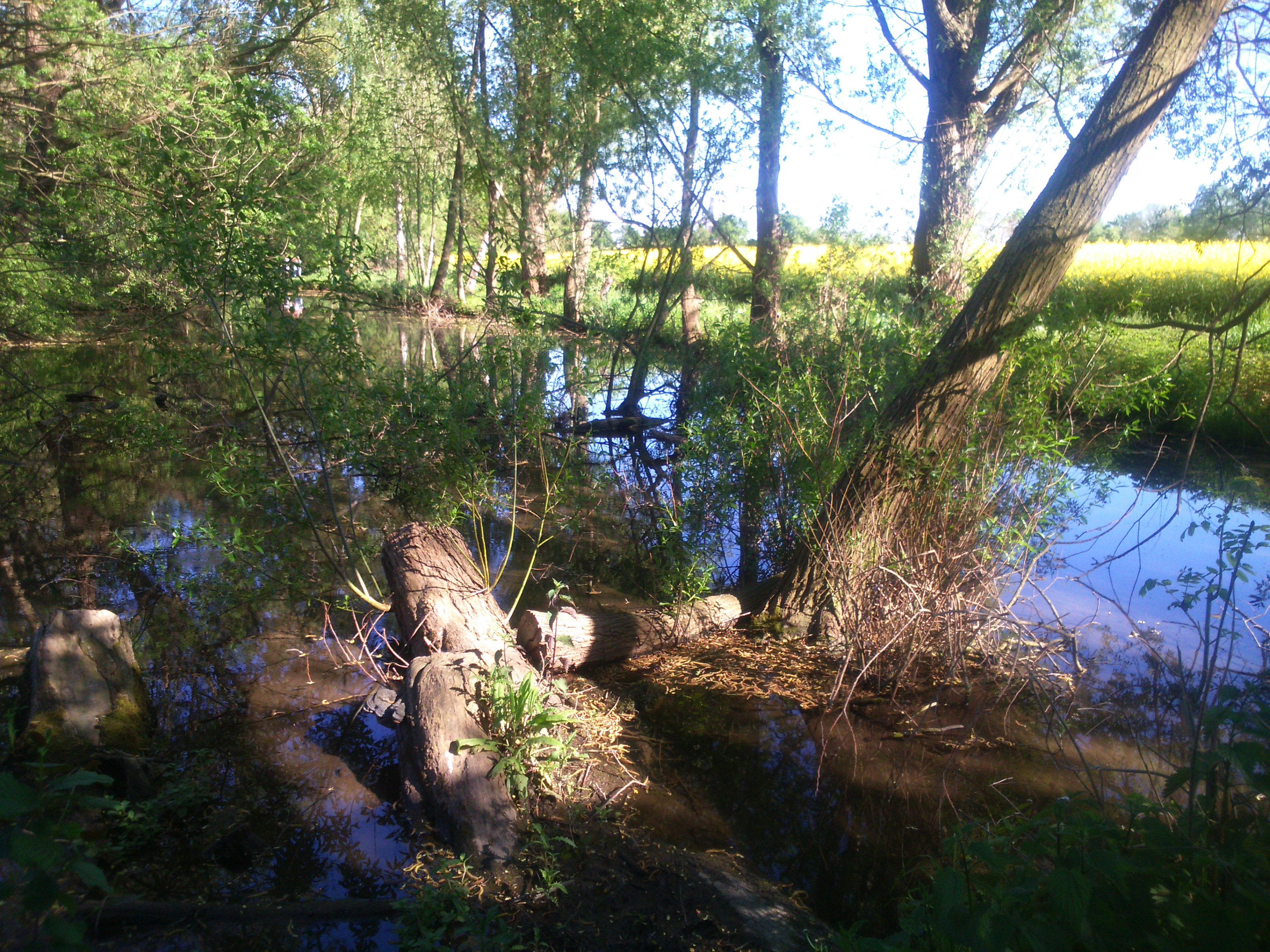 Kleiner Weiher am Pulheimer Bach in der Großen Laache; Naturschutzgebiet „Orrer Wald und Große Laache“ (Feld rechts im Hintergrund im umgebenden Landschaftsschutzgebiet)